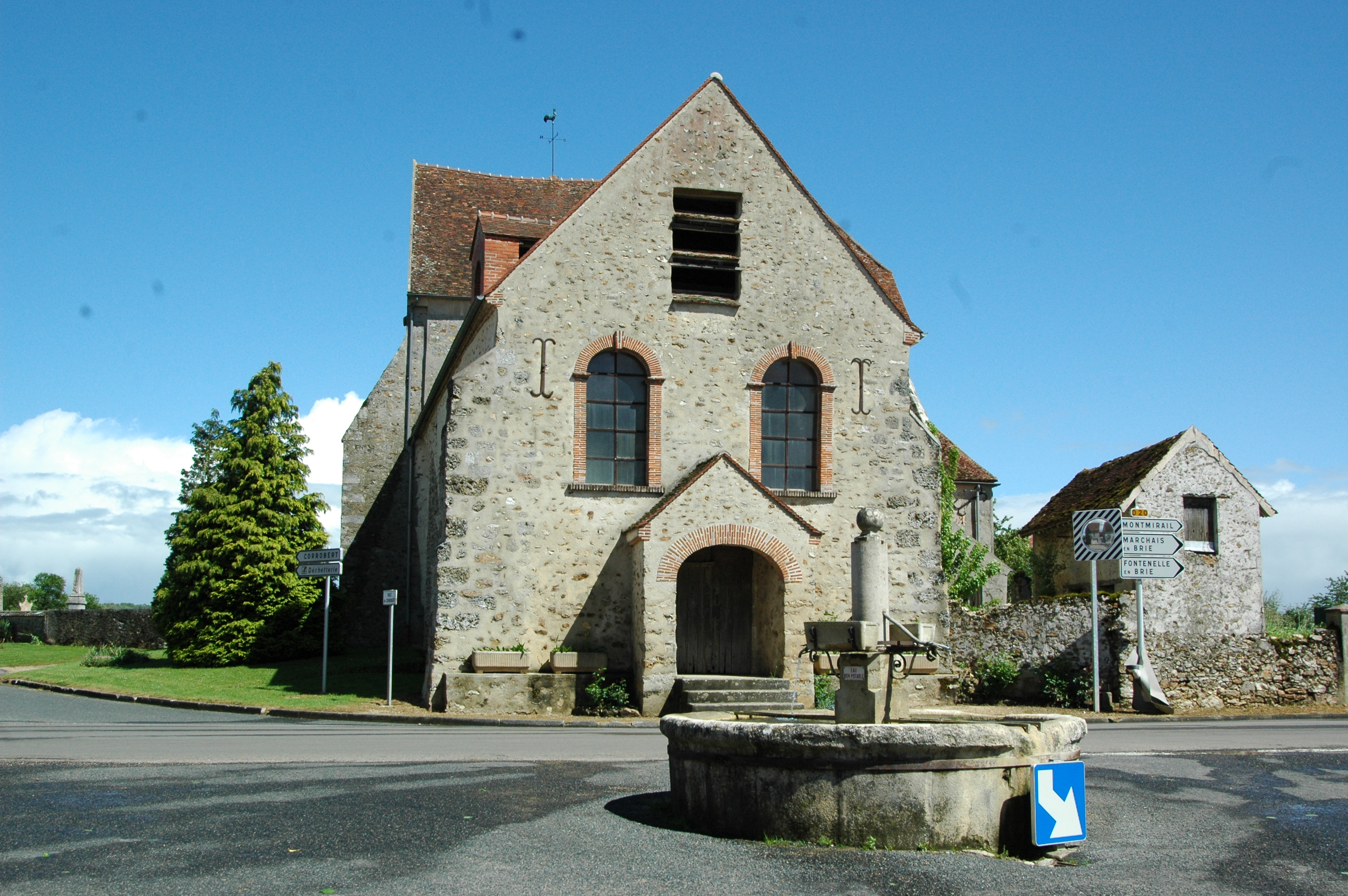 L'église d'Artonges.